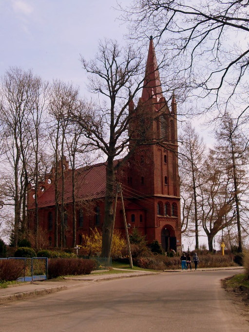 Kościół Świętej Trójcy w Dobrzycy.